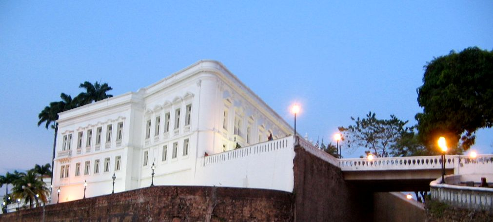 São Luís, MA: conjunto arquitetônico e paisagístico; Palácio dos Leões